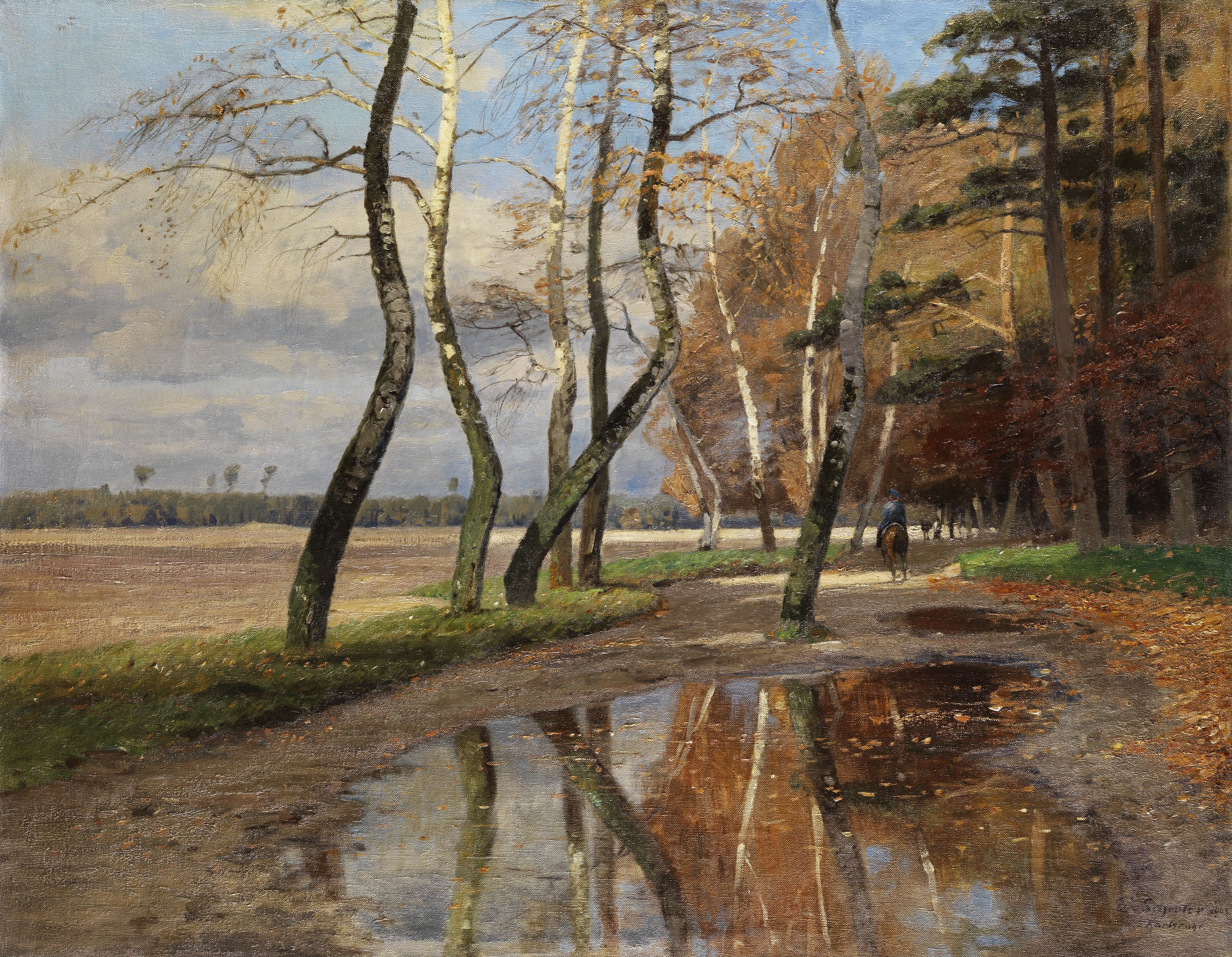 Reiter unter herbstlichen Bäumen. Öl auf Leinwand. 80 x 102 cm. Rechts unten signiert, datiert „1903” und ortsbezeichnet „Karlsruhe”.